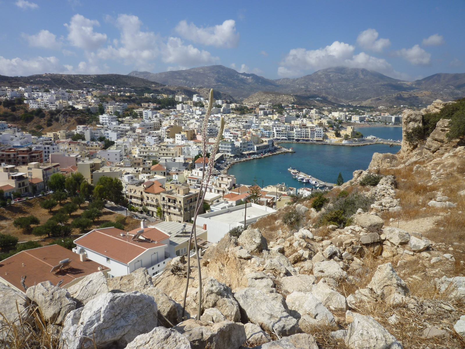 Blick auf Pigadia